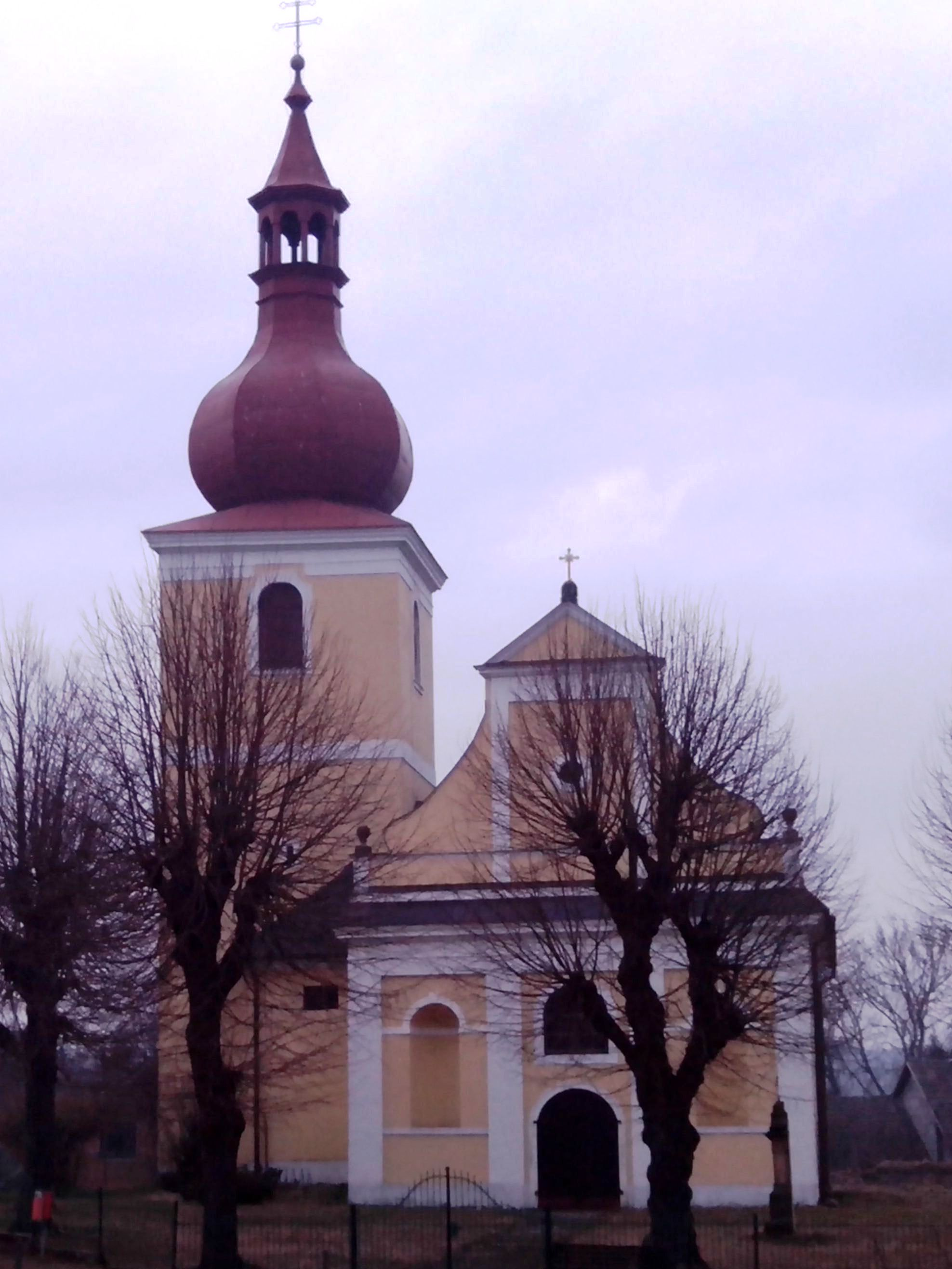 Kostel sv. Štěpána - Velký Třebešov